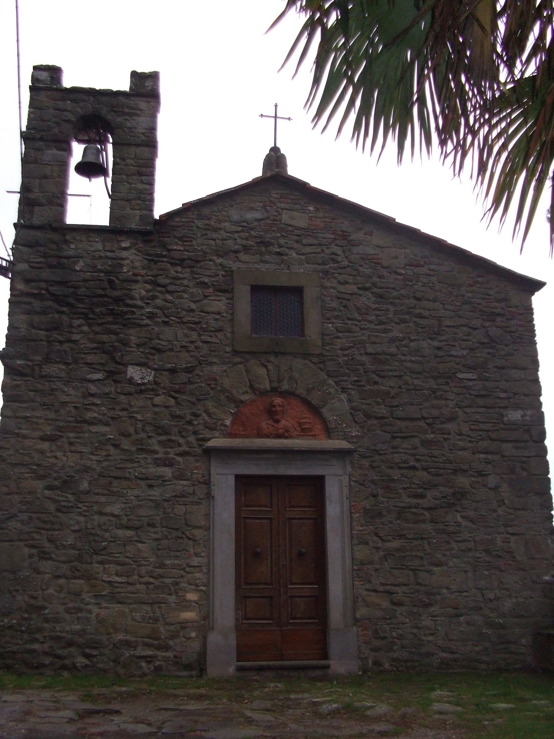 Chiesa di Mammi, frazione di Castiglion Fiorentino (AR)